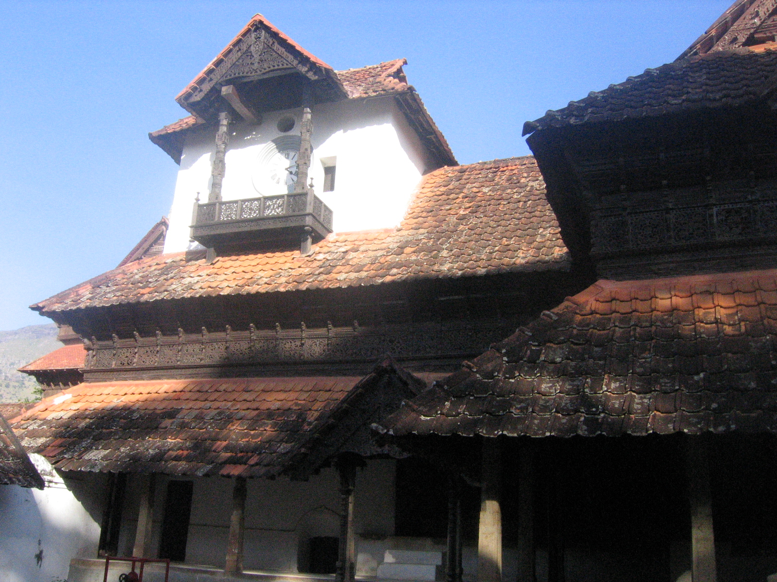 പത്മനാഭപുരം കൊട്ടാരത്തിലെ മണിമാളിക